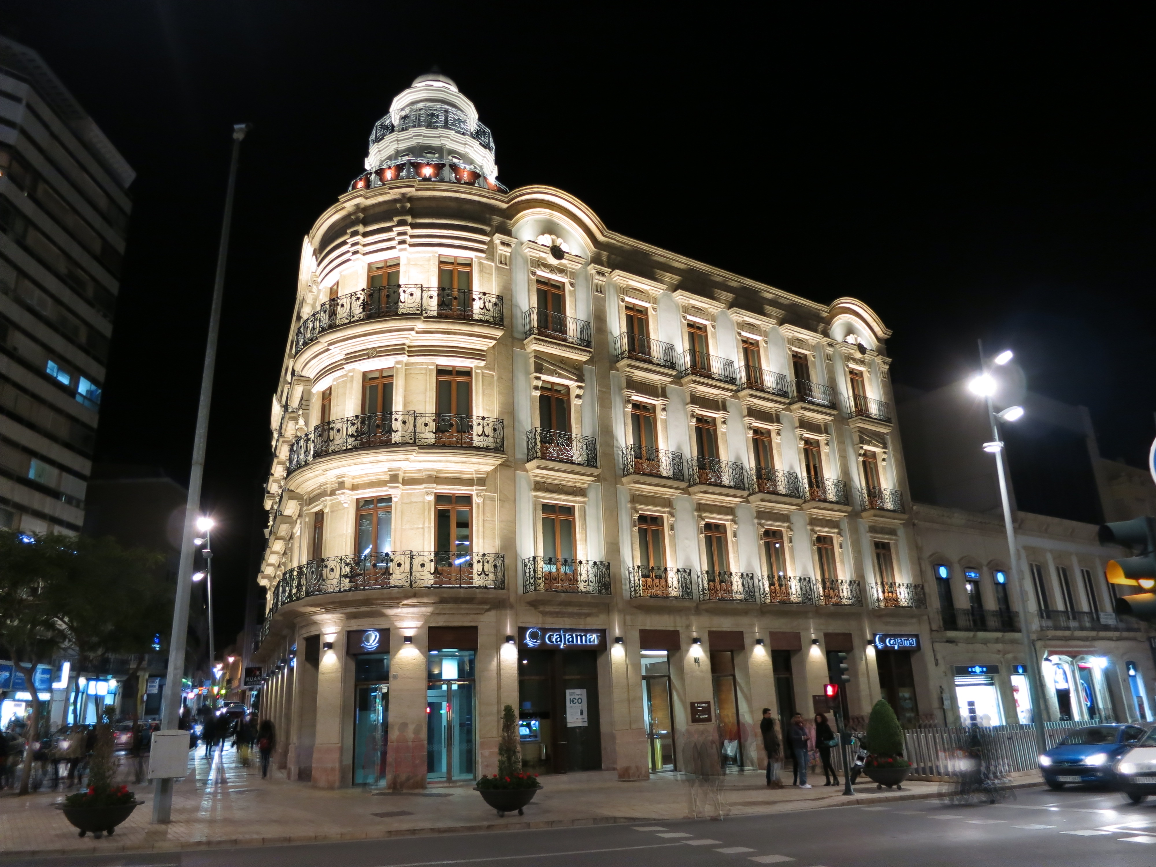 La plaza donde está este edificio es la Puerta de Purchena, que es un Bien de Interés Cultural como Conjunto Histórico. Código RI-53-0000388